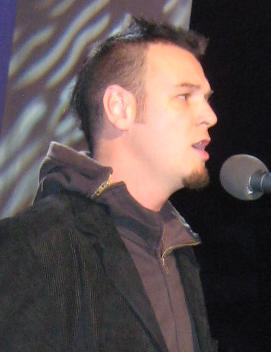 Tomi Meglič, slovenian rock singer